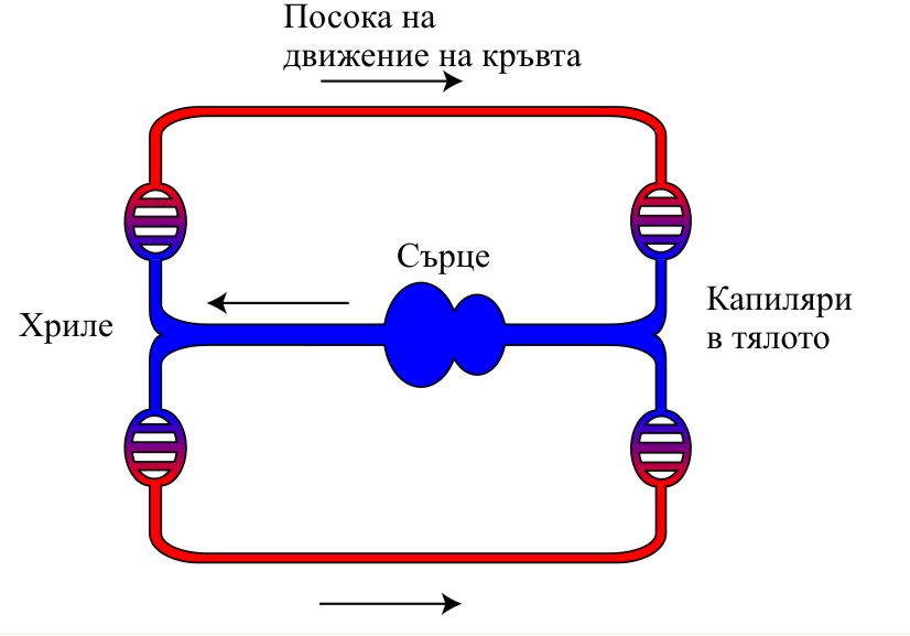 Опростено представяне на кръвоносната система при рибите, червено обозначава окислената кръв, а синьото неокислената. Изображението е съставено на Adobe Illustrator 10 от User:Lennert B на 26.11.05 под името Image:Blutkreislauf_Fische.svg и преведено на български от User:Azimski на 25.04.07